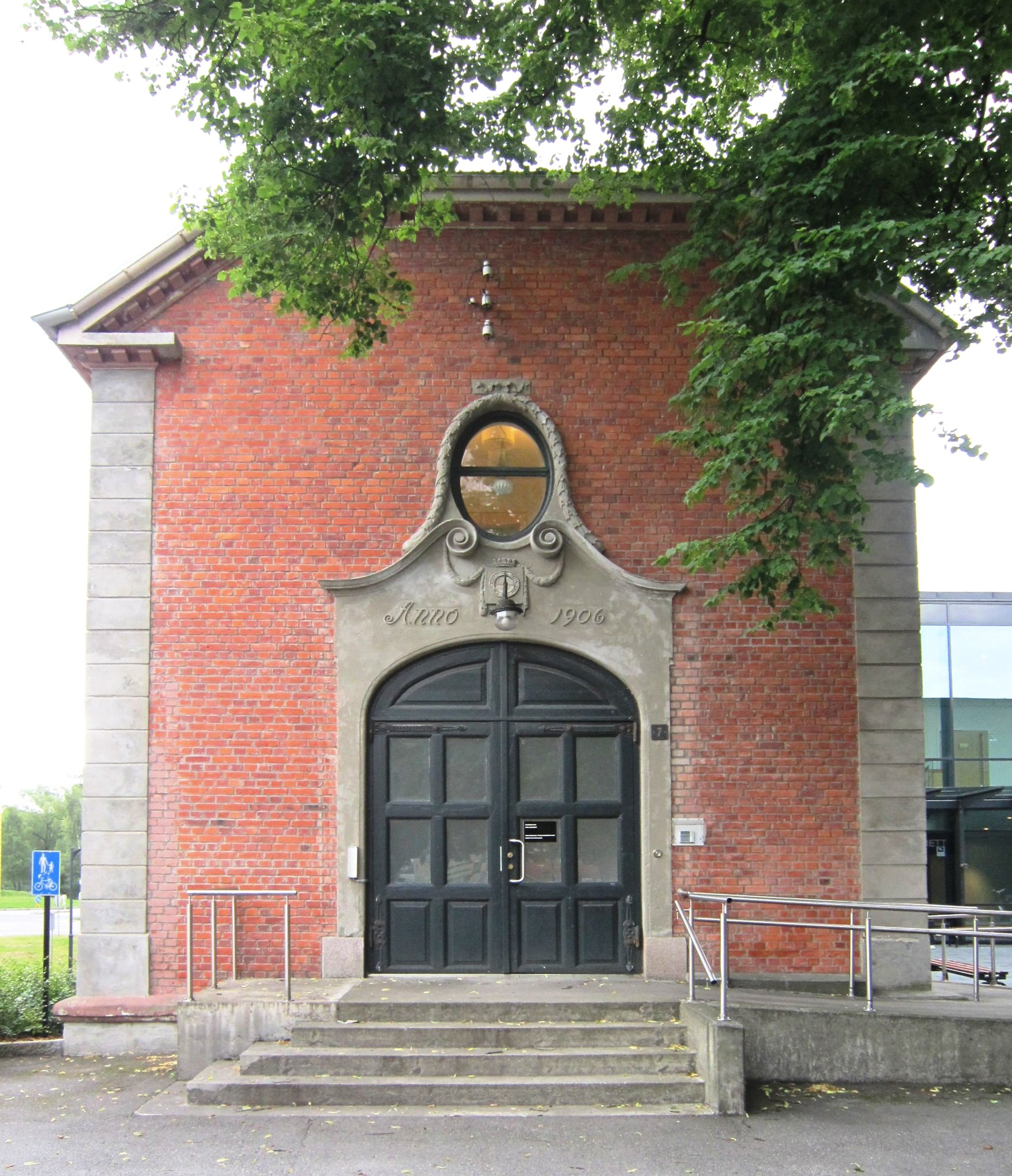 Moss tingrett. (Gammel bygning. Et nyere bygg brukes i dag.)